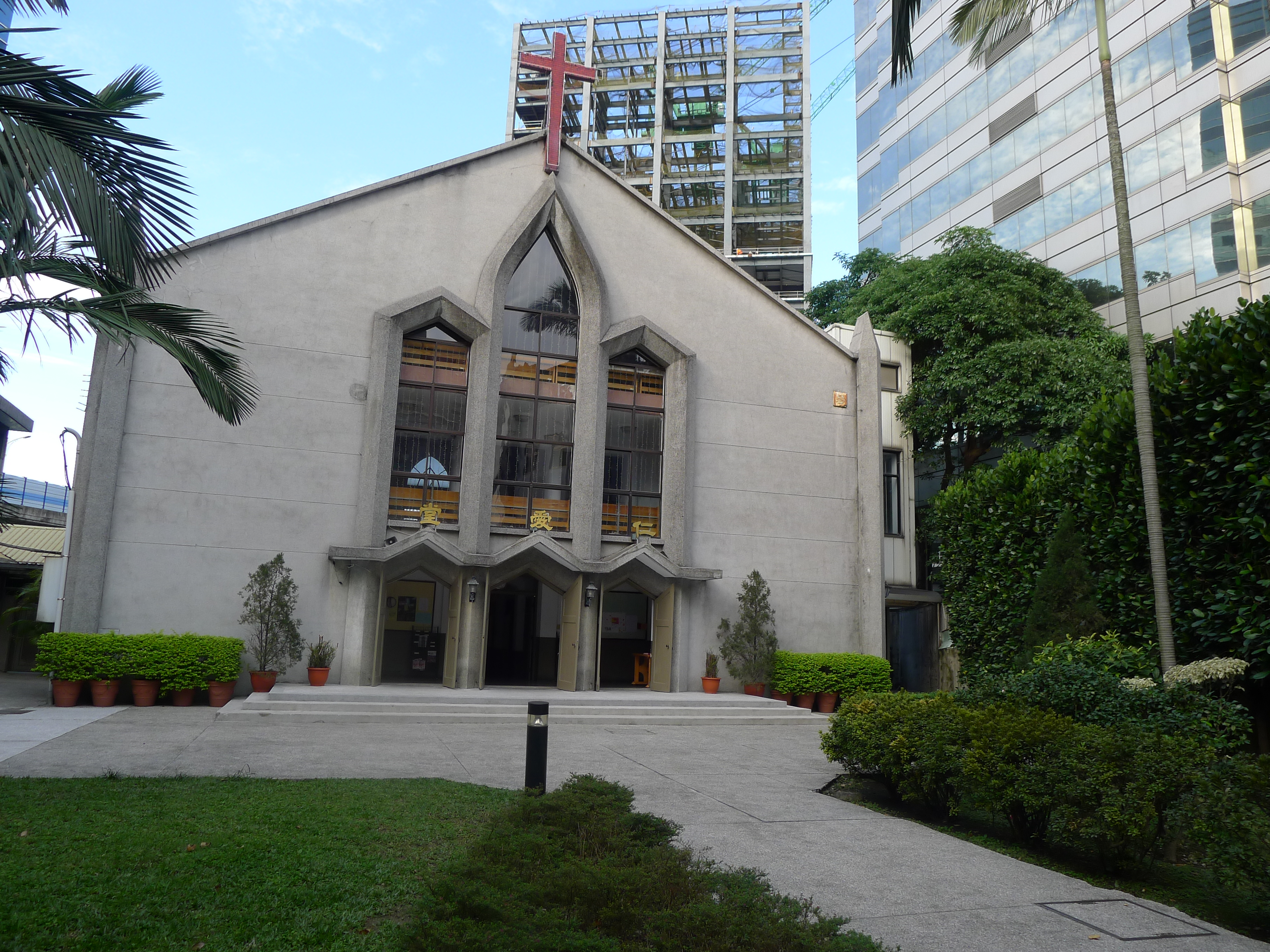 仁愛堂